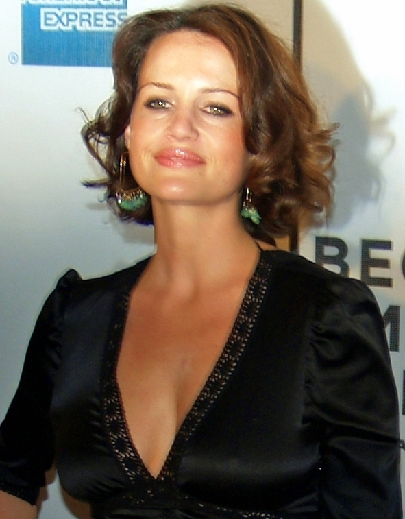 Carla Gugino - cropped